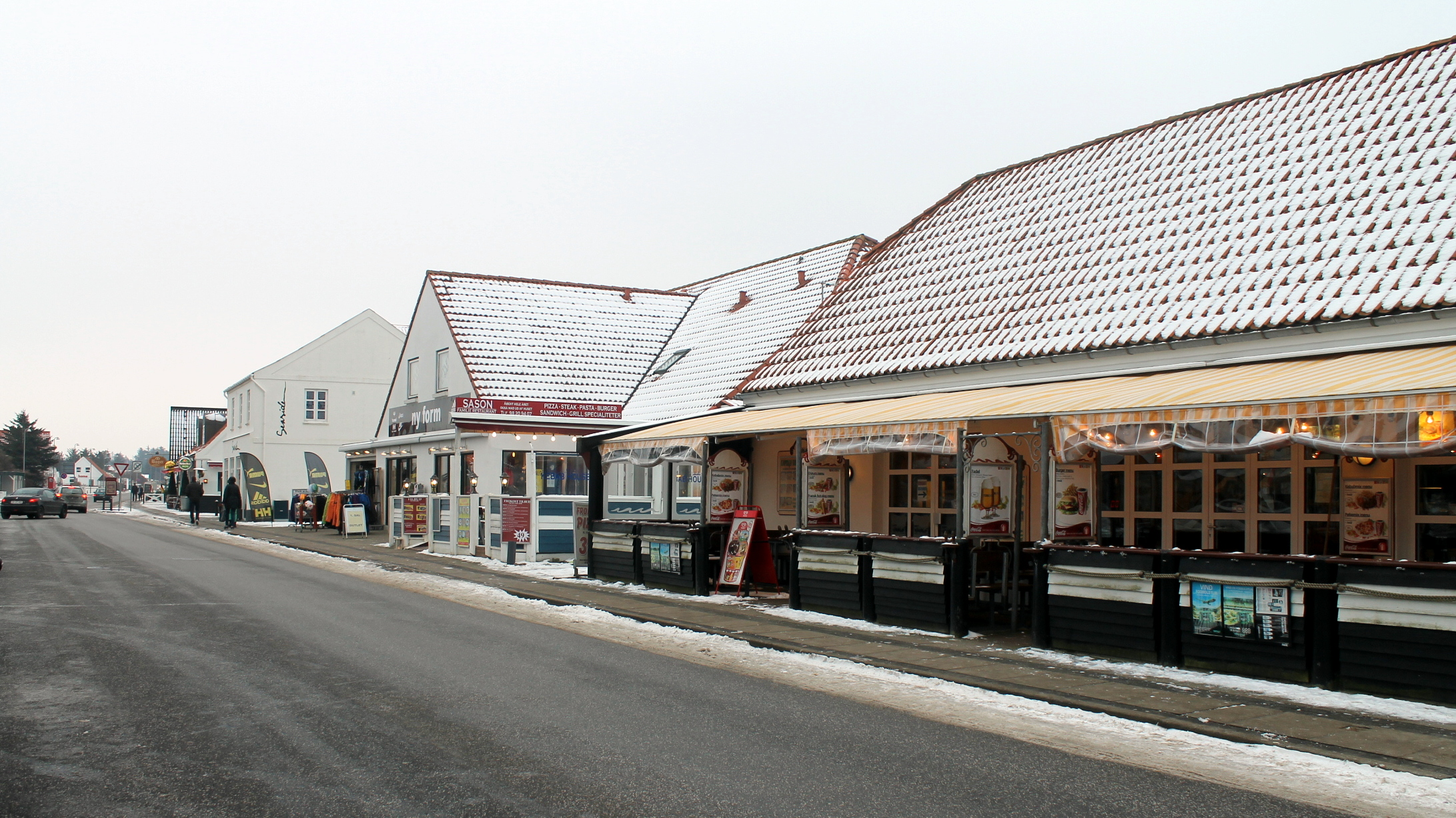 Blokhus restaurantsgade